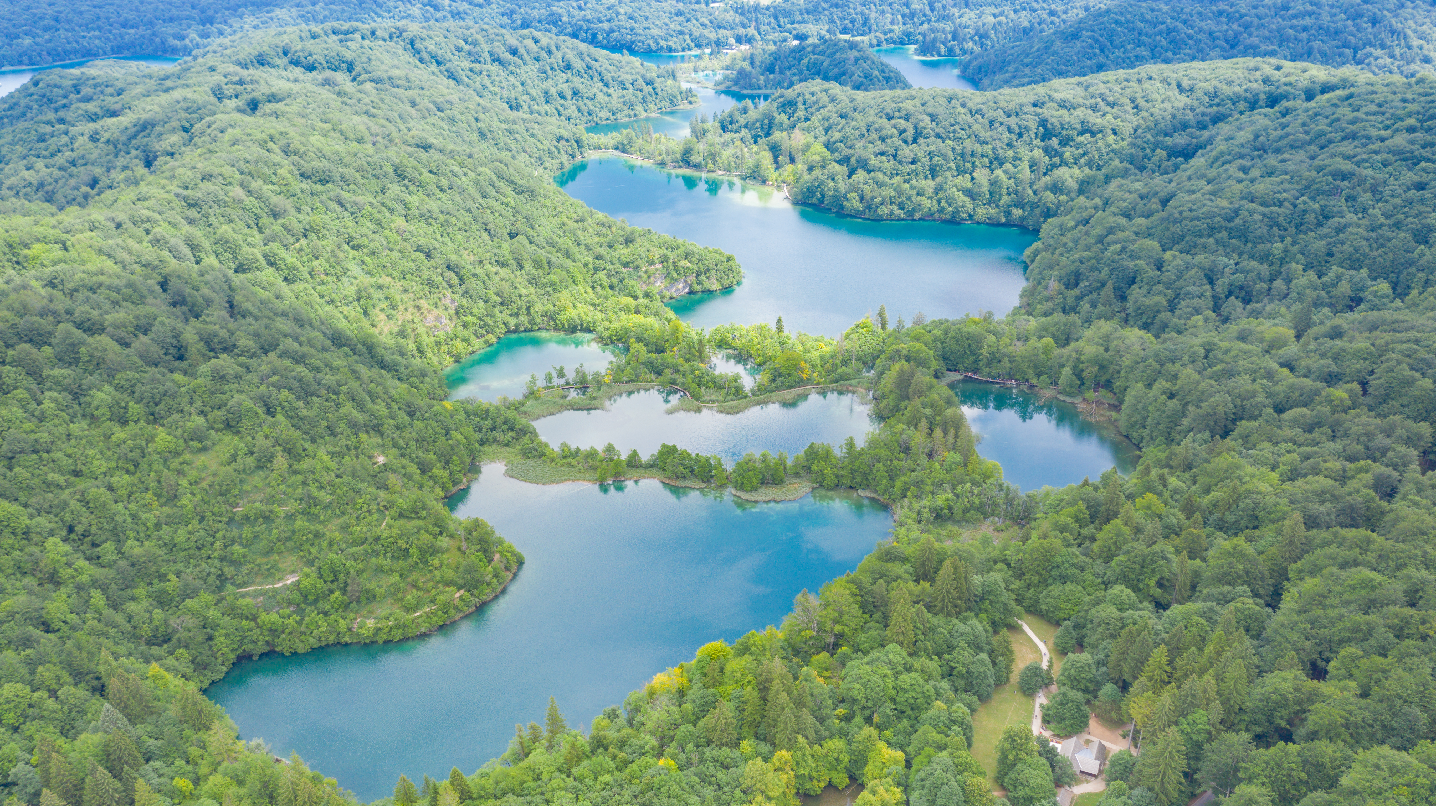 Luftbild von Plitvicer Seen in Kroatien